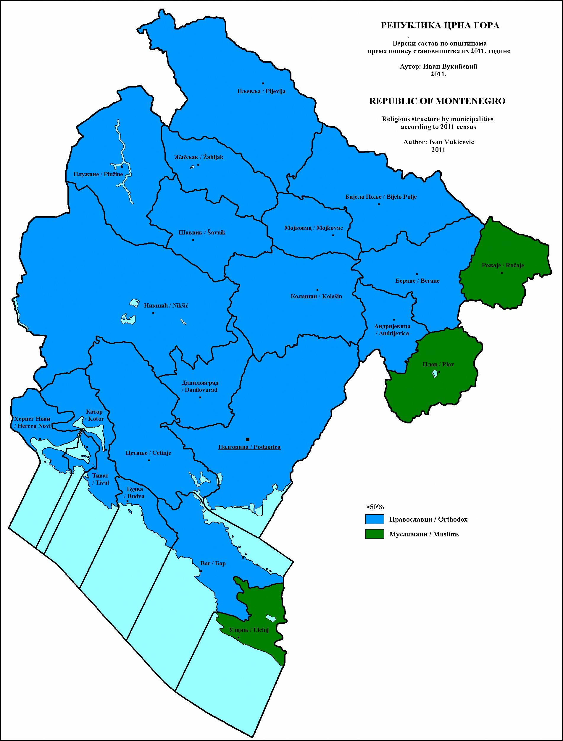 Верски састав Црне Горе по општинама 2011. године. Аутор: Иван Вукићевић